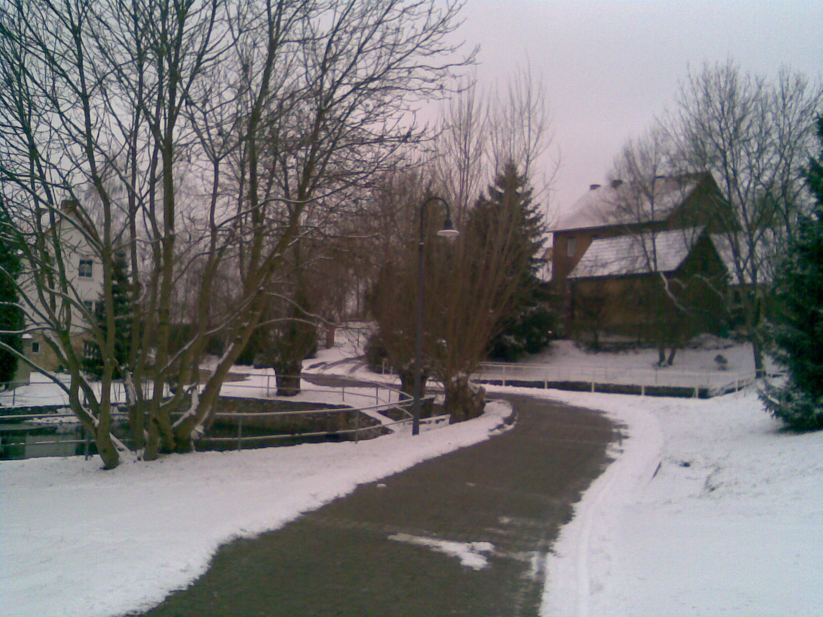 Abtlöbnitz Dorfteich